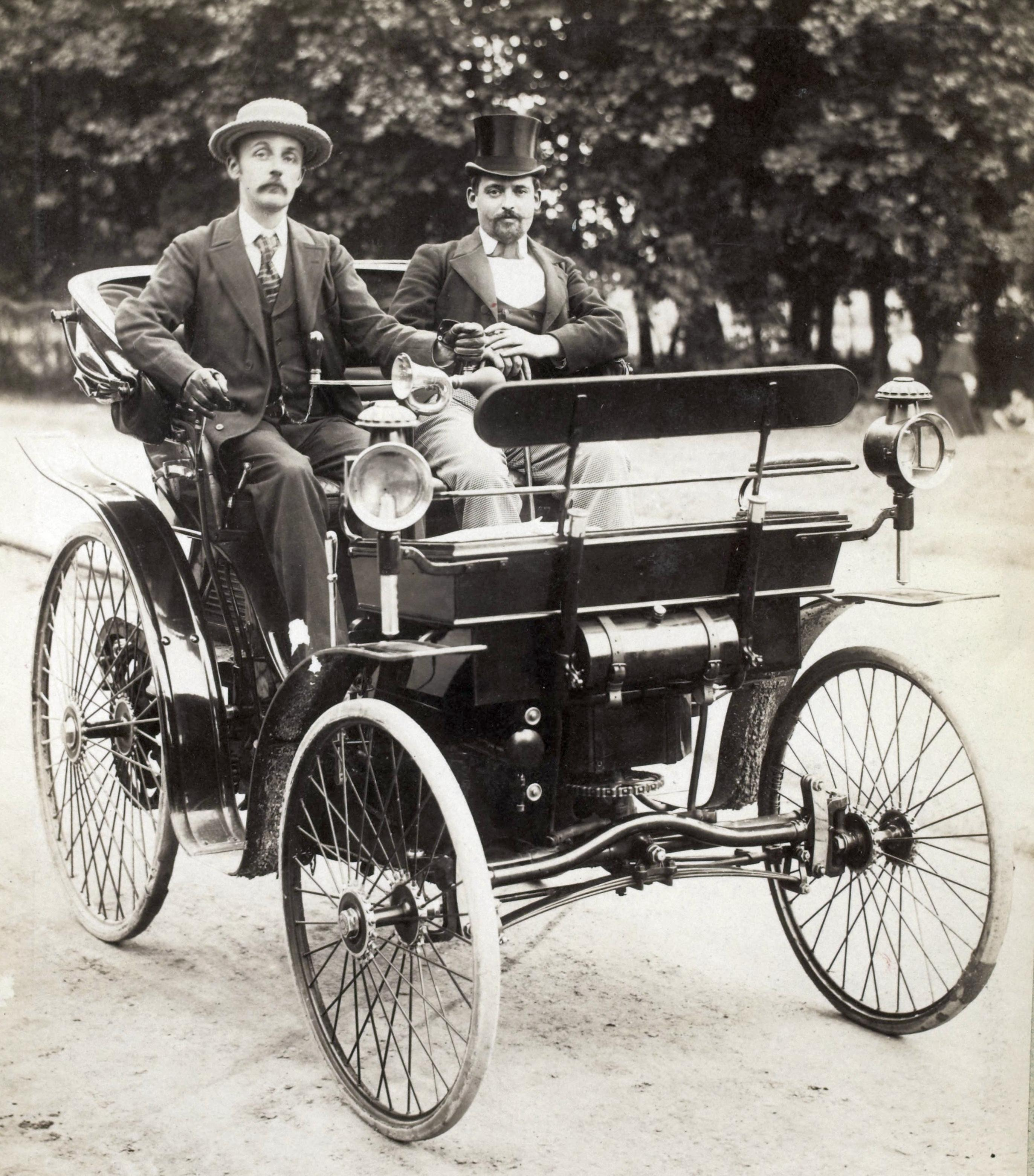 [Collection Jules Beau. Photographie sportive] : T. 1. Années 1894 et 1895 / Jules Beau : F. 46. Archdeacon, Voiture Peugeot